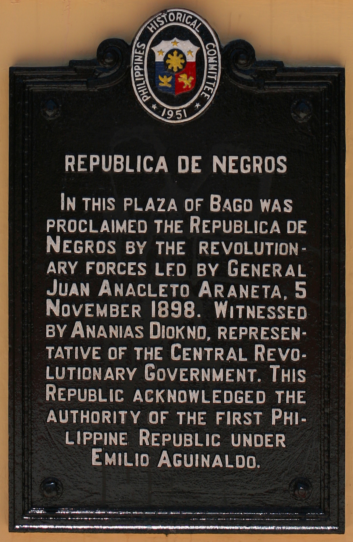 Targa a ricordo della Repubblica di Negros a Bago, Negros Occidental, Filippine